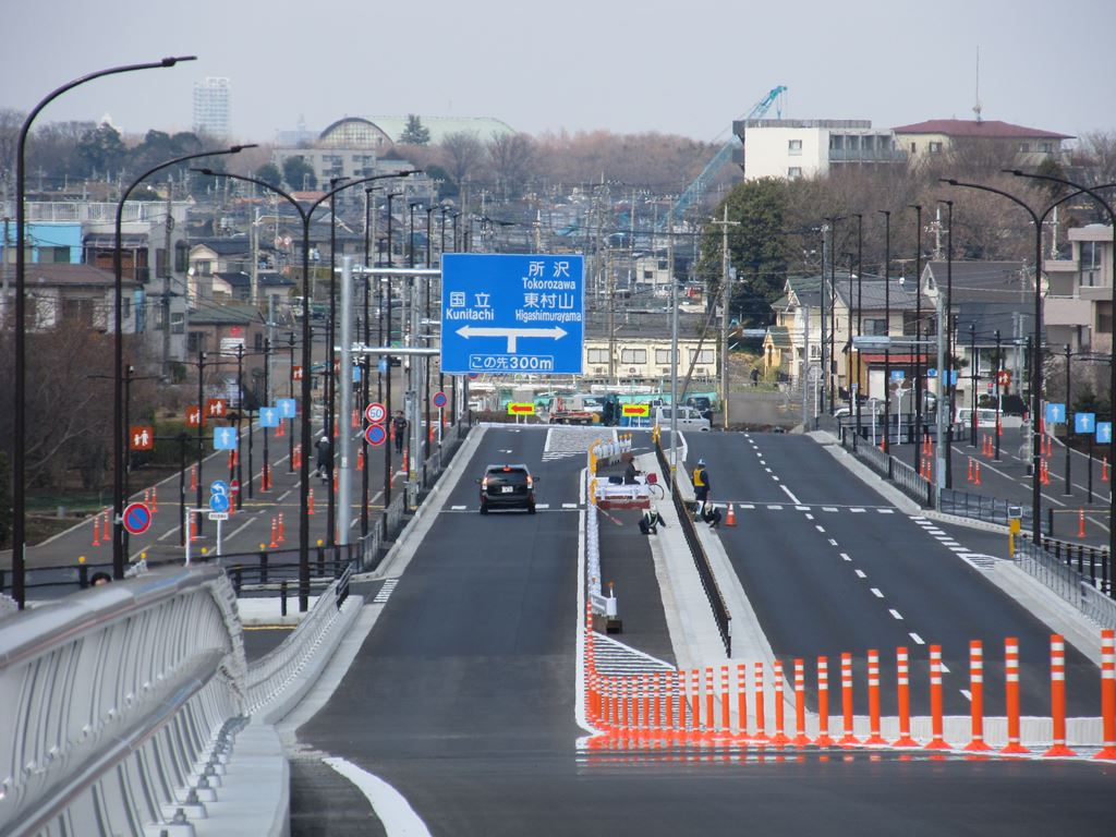 多摩南北道路3号線（府中所沢線および鎌倉街道線）